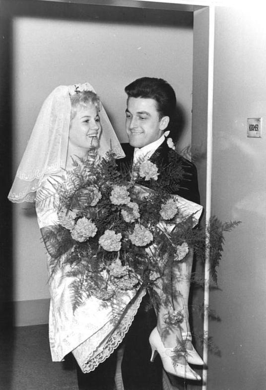 Zentralbild-Kohls 10.11.1963 Dresden: Ingrid Krämer vollzog den Sprung in die Ehe. Ihren bedeutsamsten Sprung seit dem olympischen Doppelerfolg in Rom vollzog die Verdiente Meisterin des Sports Ingrid Krämer (SC Einheit Dresden) in der Mittagsstunde des 9.11.1963, er führte in die Ehe. Auf dem Dresdner Standesamt in der Tiergartenstrasse gab die 20jährige Olympiasiegerin und Europameisterin den 23-jährigen Studenten Hein Engel ihr Ja-Wort. Hein ist aktiver Gewichtheber. UBz.: Nicht umsonst ist Hein Engel Gewichtheber- hier trägt er seine junge Frau über die Schwelle der elterlichen Wohnung.